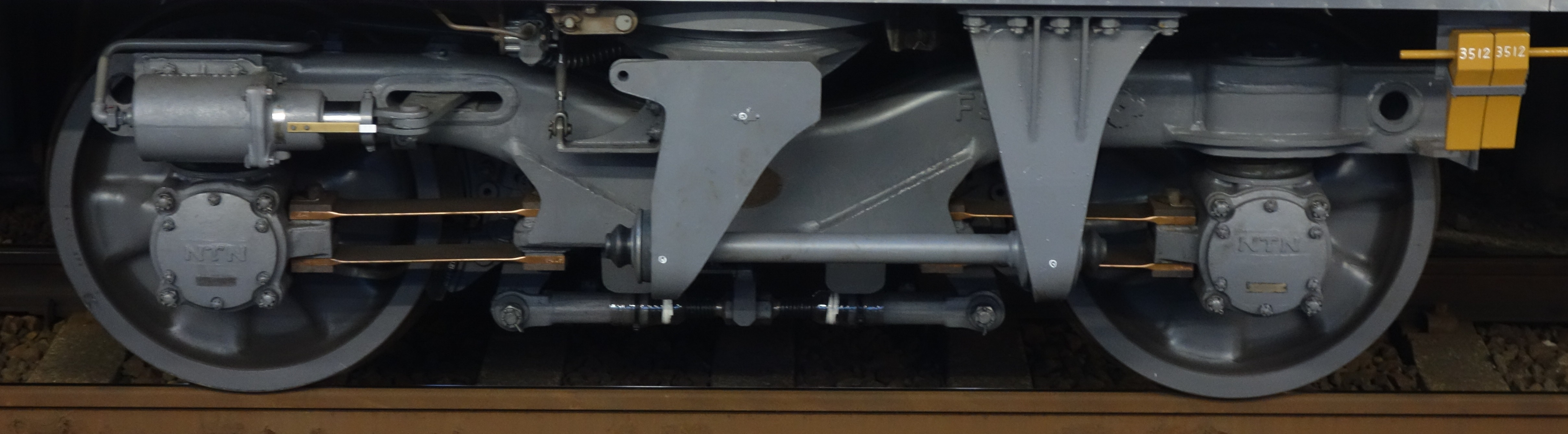 泉北3000系 S形ミンデン・空気バネ台車